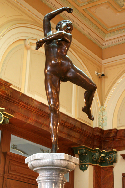 Plastika Tanečnice od Aloise Holuba z 40. let 20. stol. umístěná ve foyer Měšťanské besedy v Plzni.